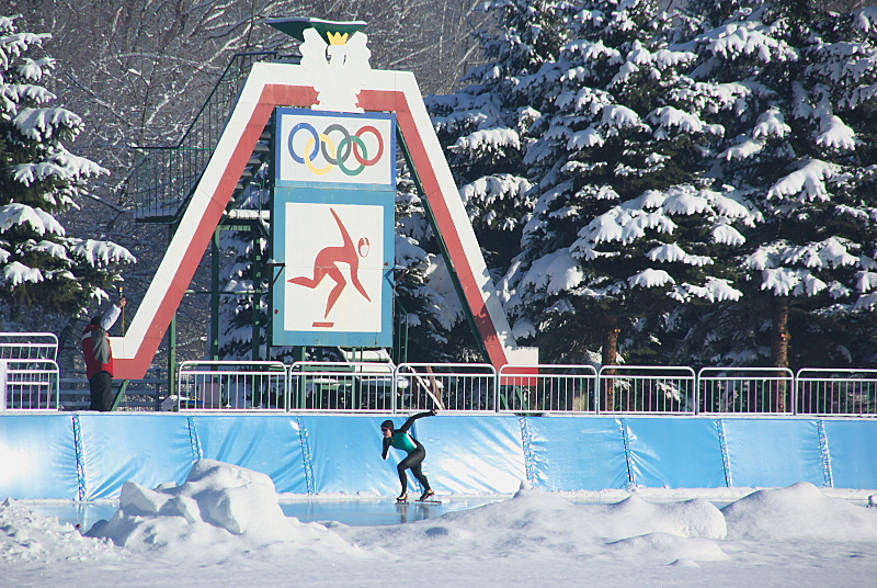 Sanok